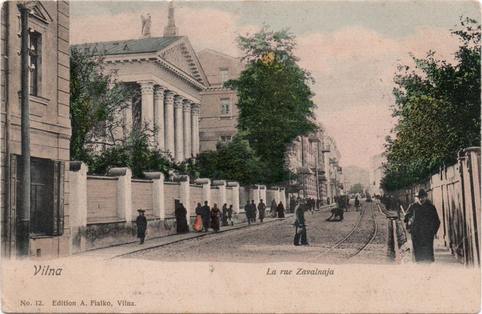 Беларуская (тарашкевіца): Вільня (Vilnia), вуліца Завальная (vulica Zavalnaja). Кальвінскі збор